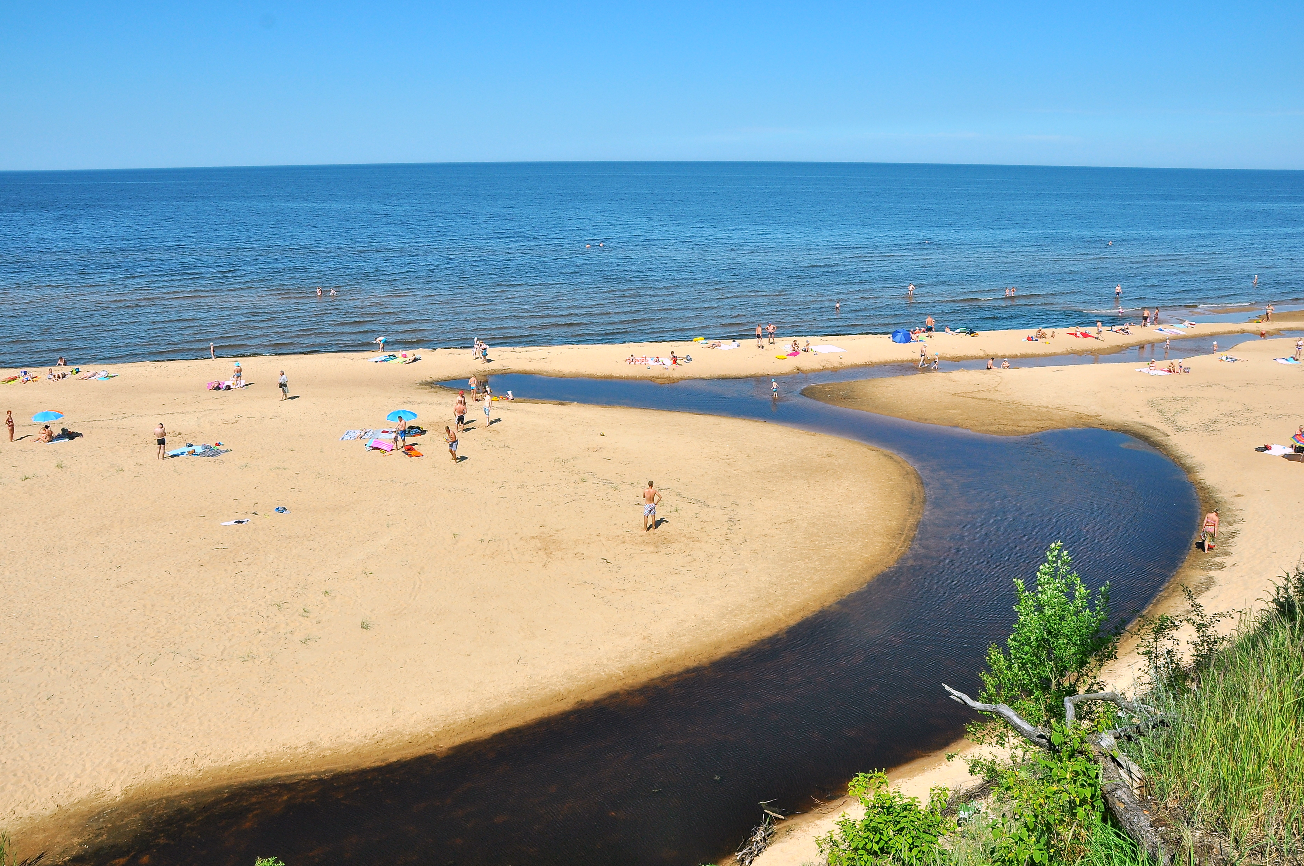 Skats no Saulrieta takas